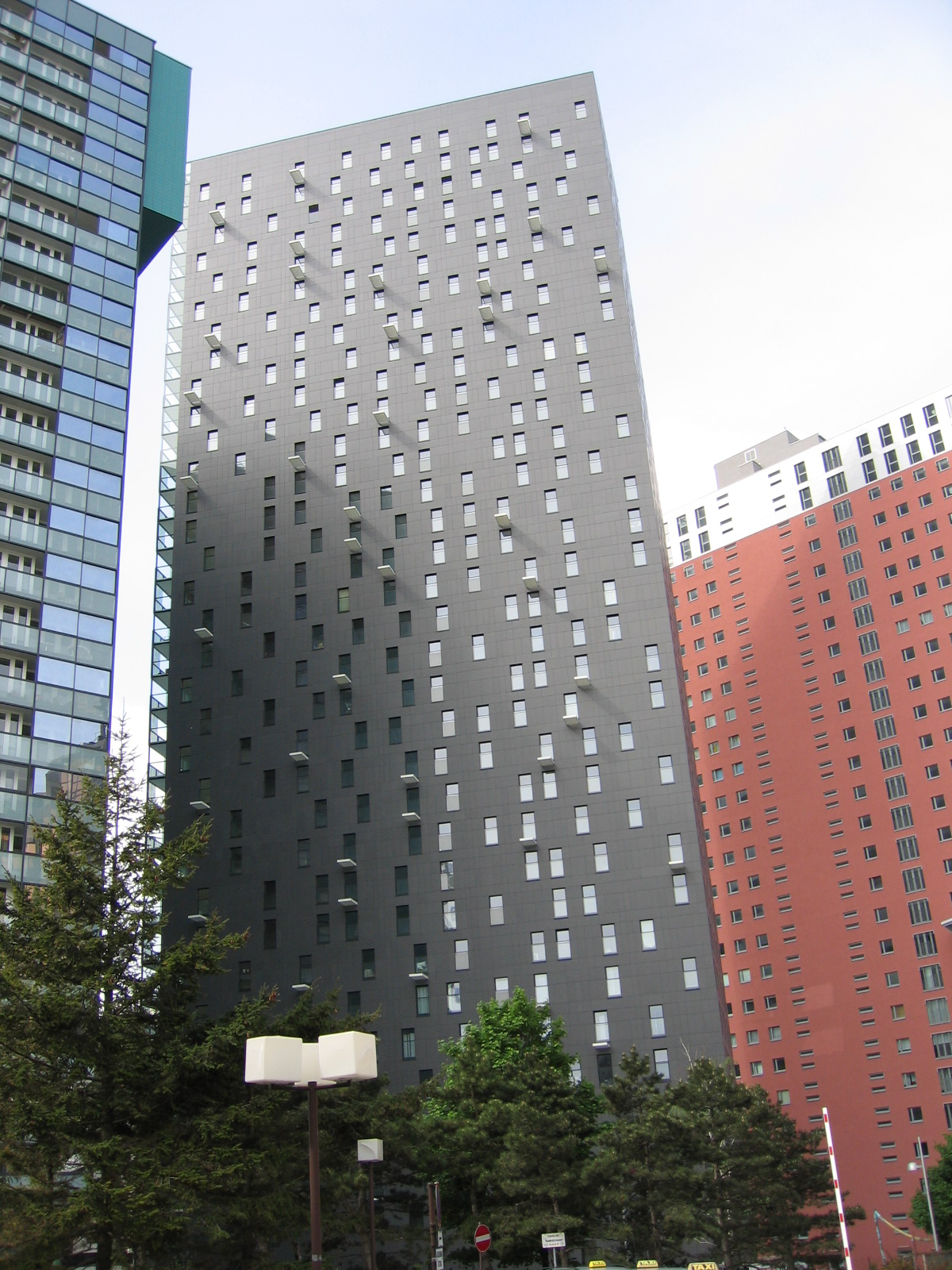 Delugan-Meissl Tower at the Wienerberg in Vienna Delugan-Meissl-Turm am Wienerberg in der Mitte des Bildes. Links davon: Monte Verde Turm Rechts davon: Mischek-Coop-Himmeblau-Turm